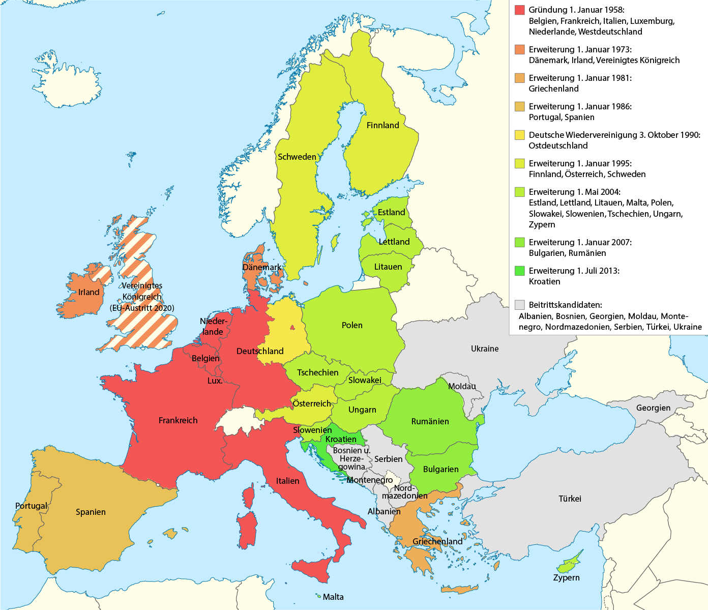 Erweiterungen der EU